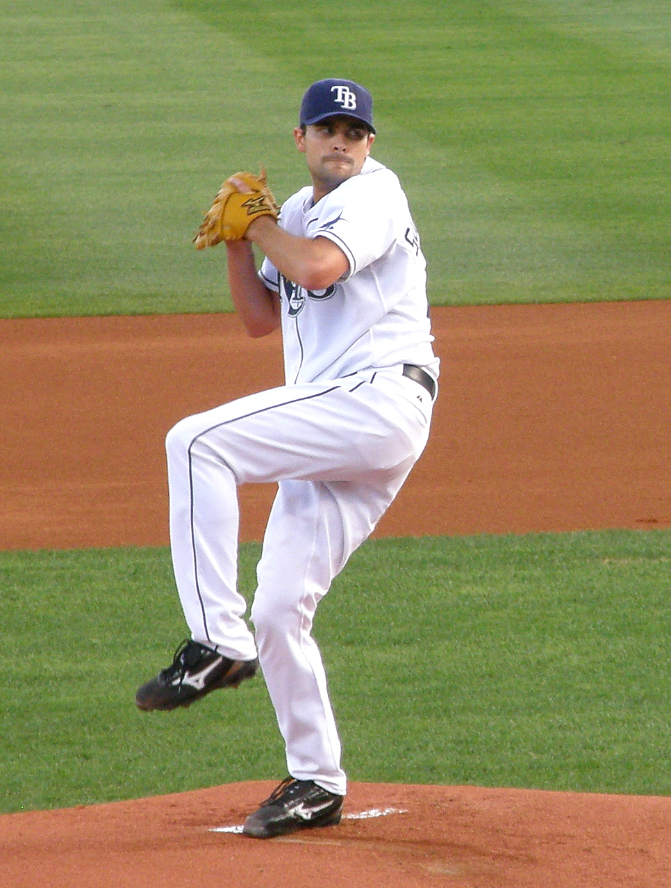 Andy Sonnanstine